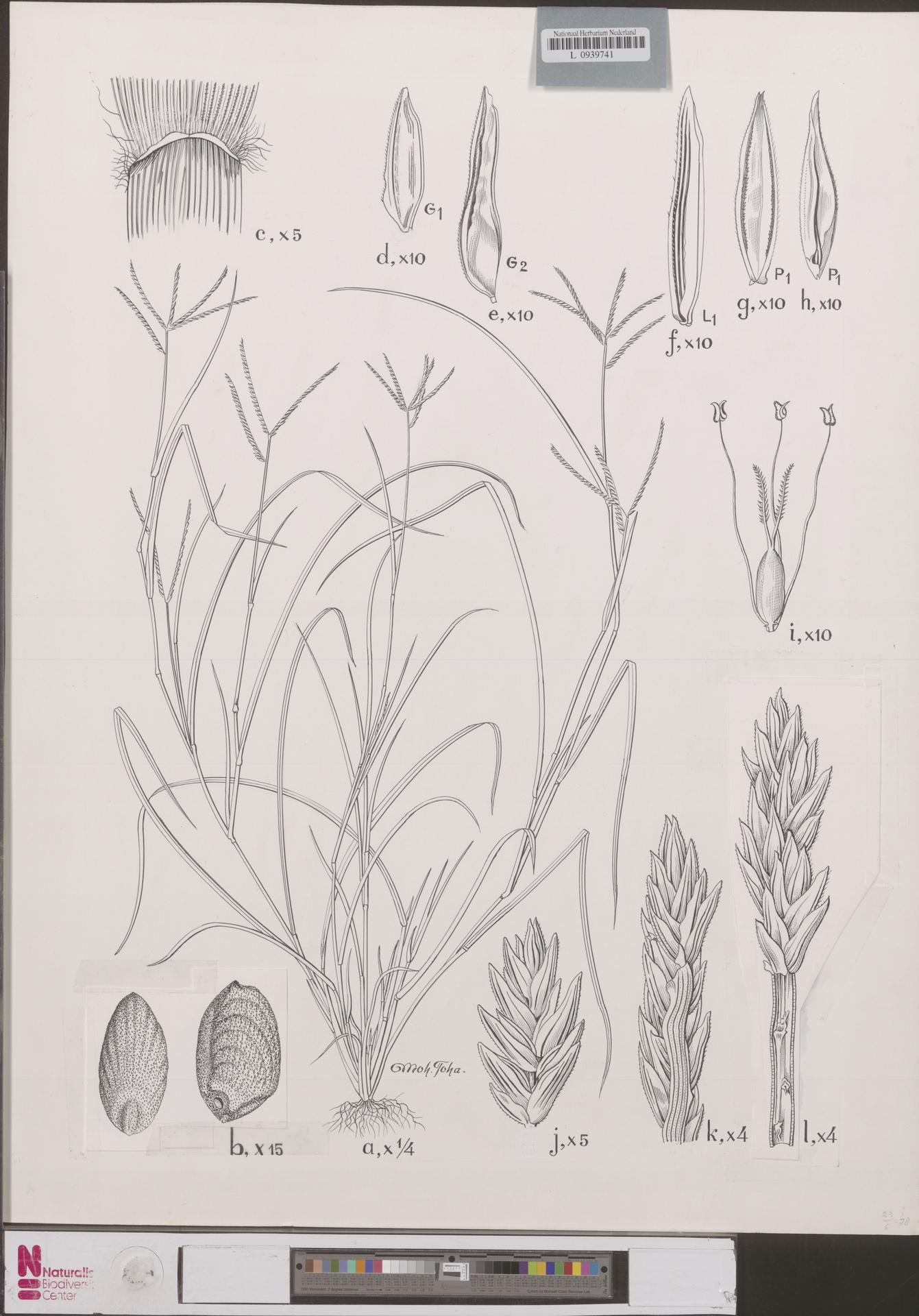 Eleusine indica (Linnaeus) Gaertner